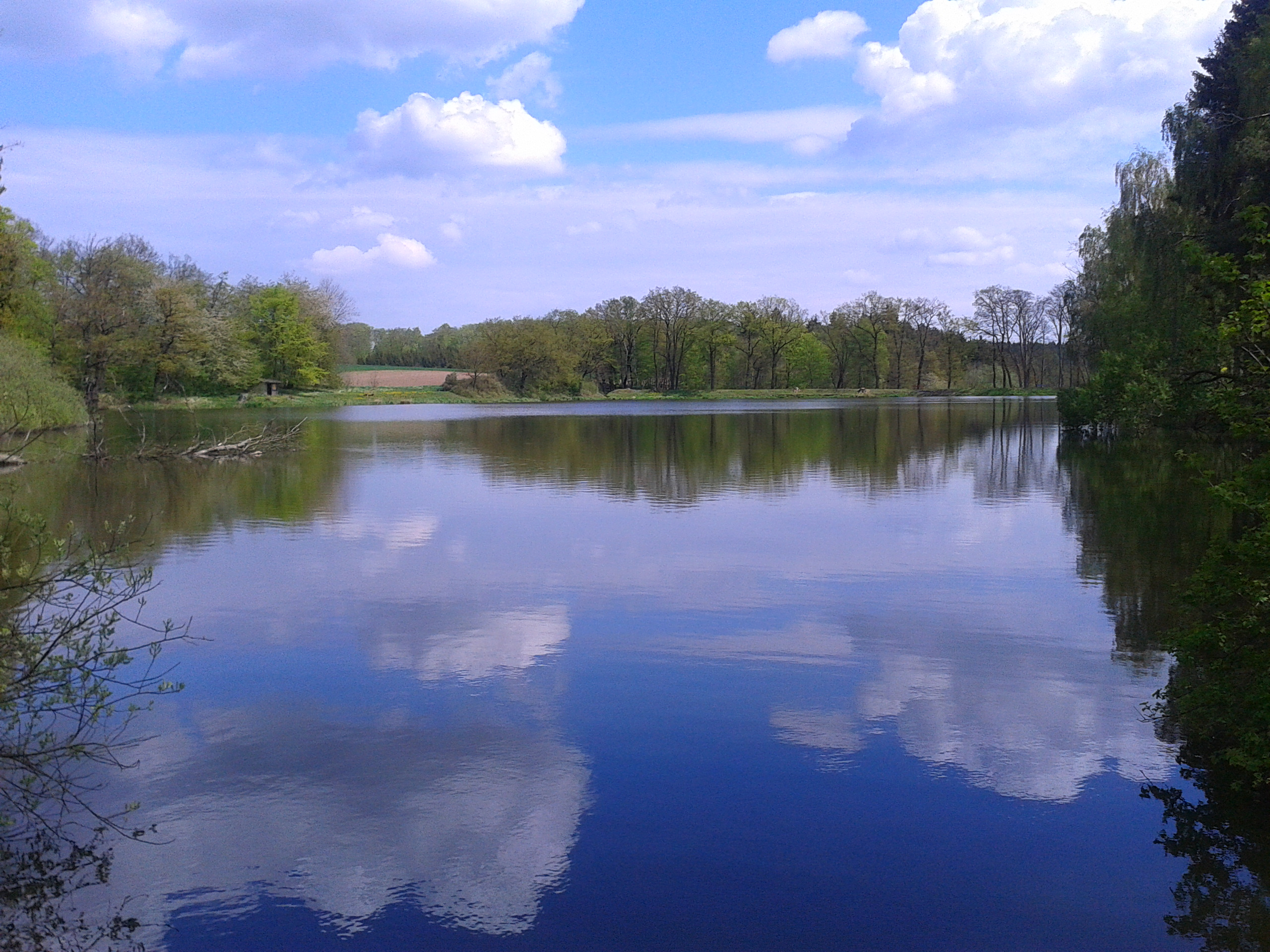 Blick über den Kunstteich Neudorf